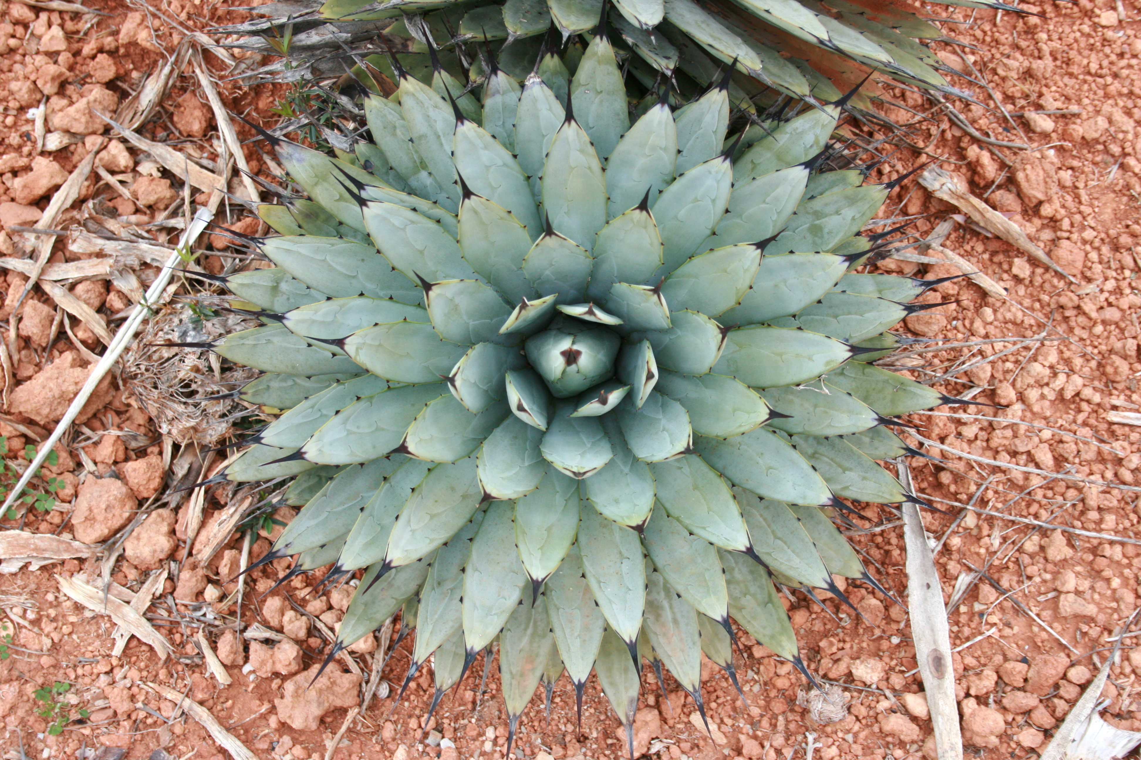 Botanicactus in Ses Salines, Mallorca, Spain